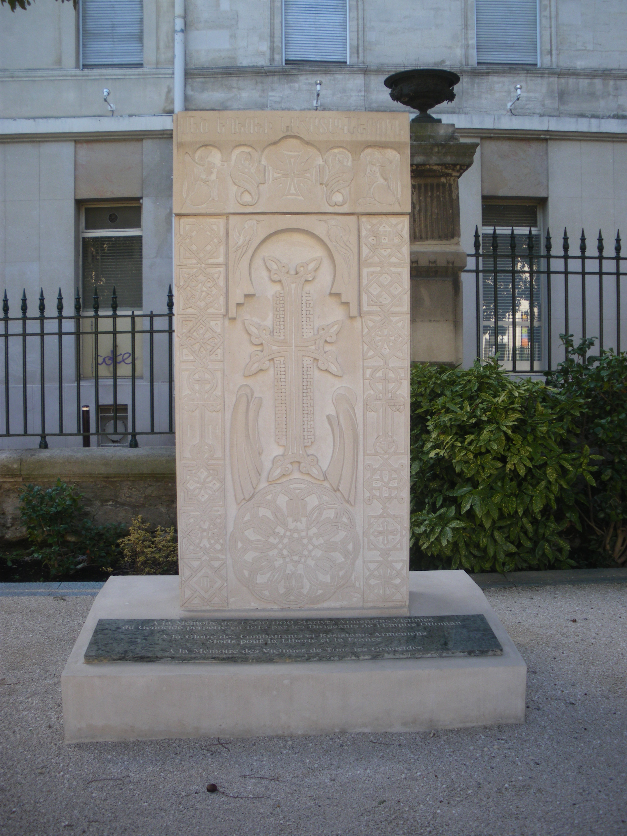 Mémorial pour les martyrs arméniens de 1915, Avignon, Vaucluse, France